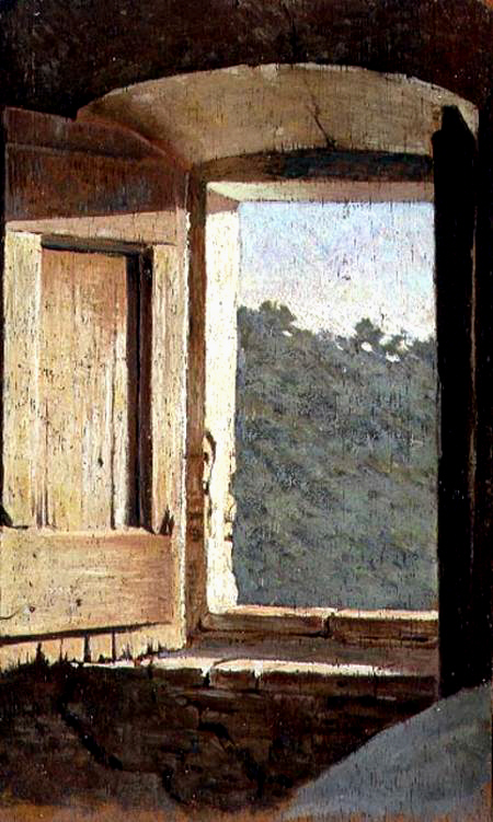 La Finestra